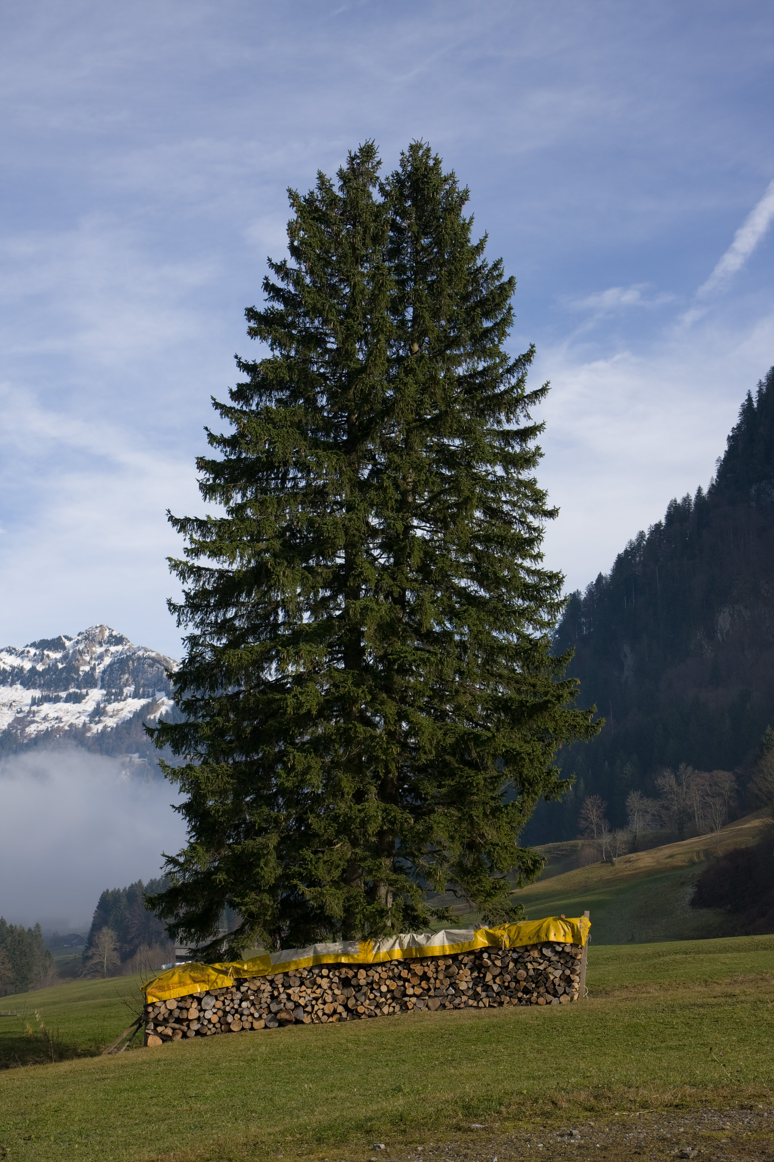 Tanne bei Stein SG